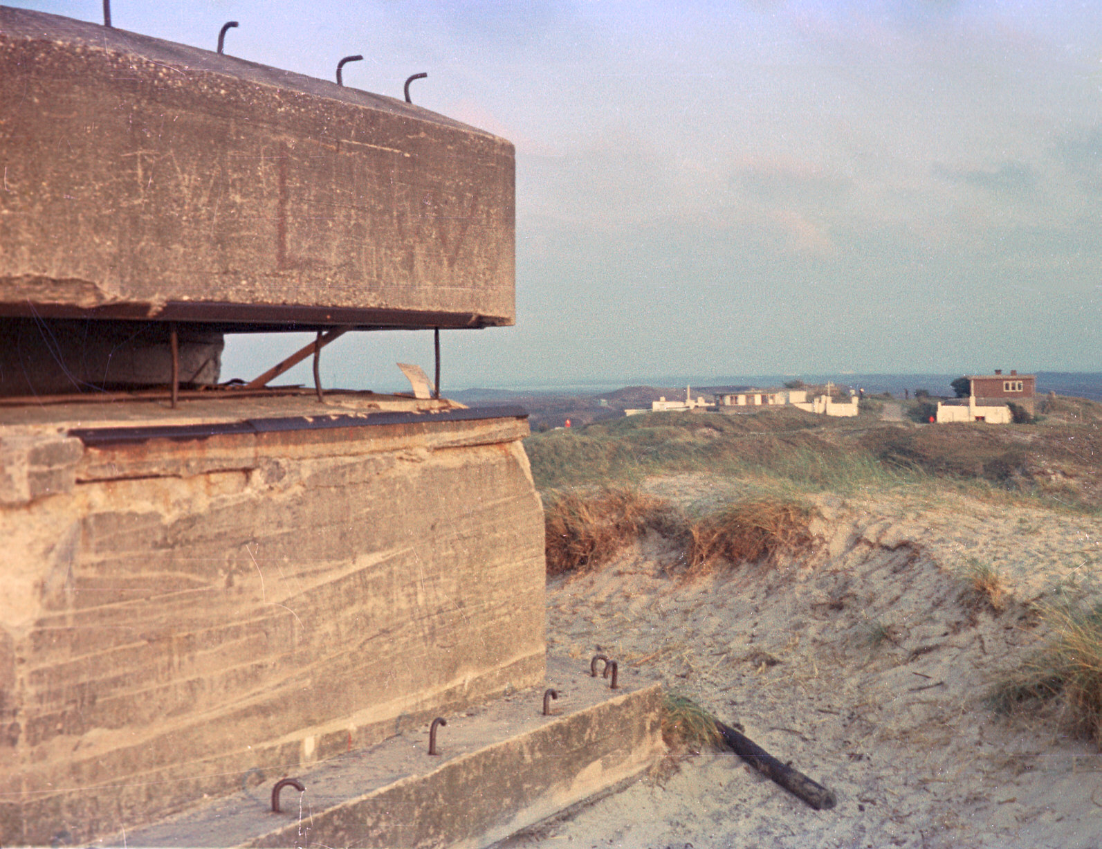 Reste von Bunkern der deutschen Besatzung im zweiten Weltkrieg auf Loodsmansduin, Texel, Niederlande